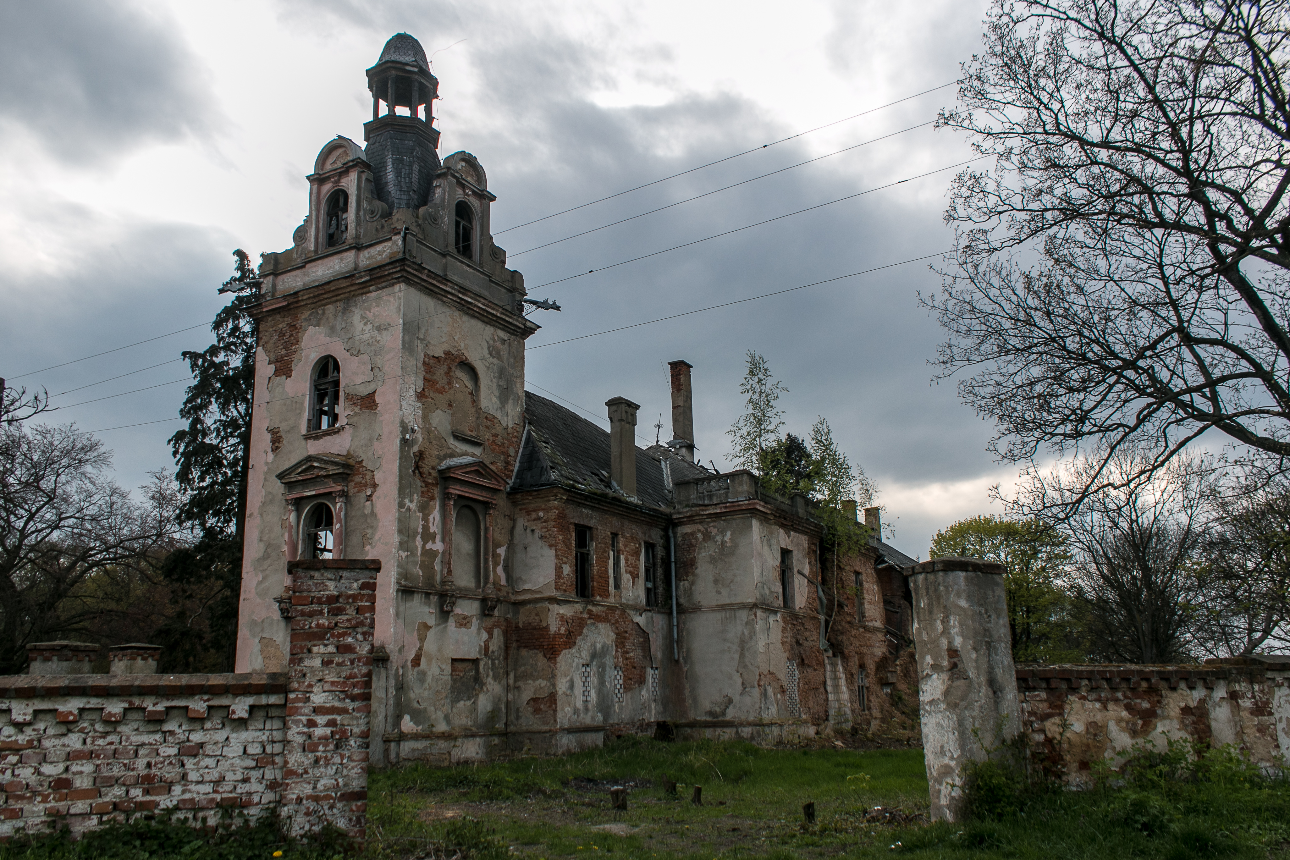 Samborowice, pałac, pocz. XIX, 2 poł. XIX